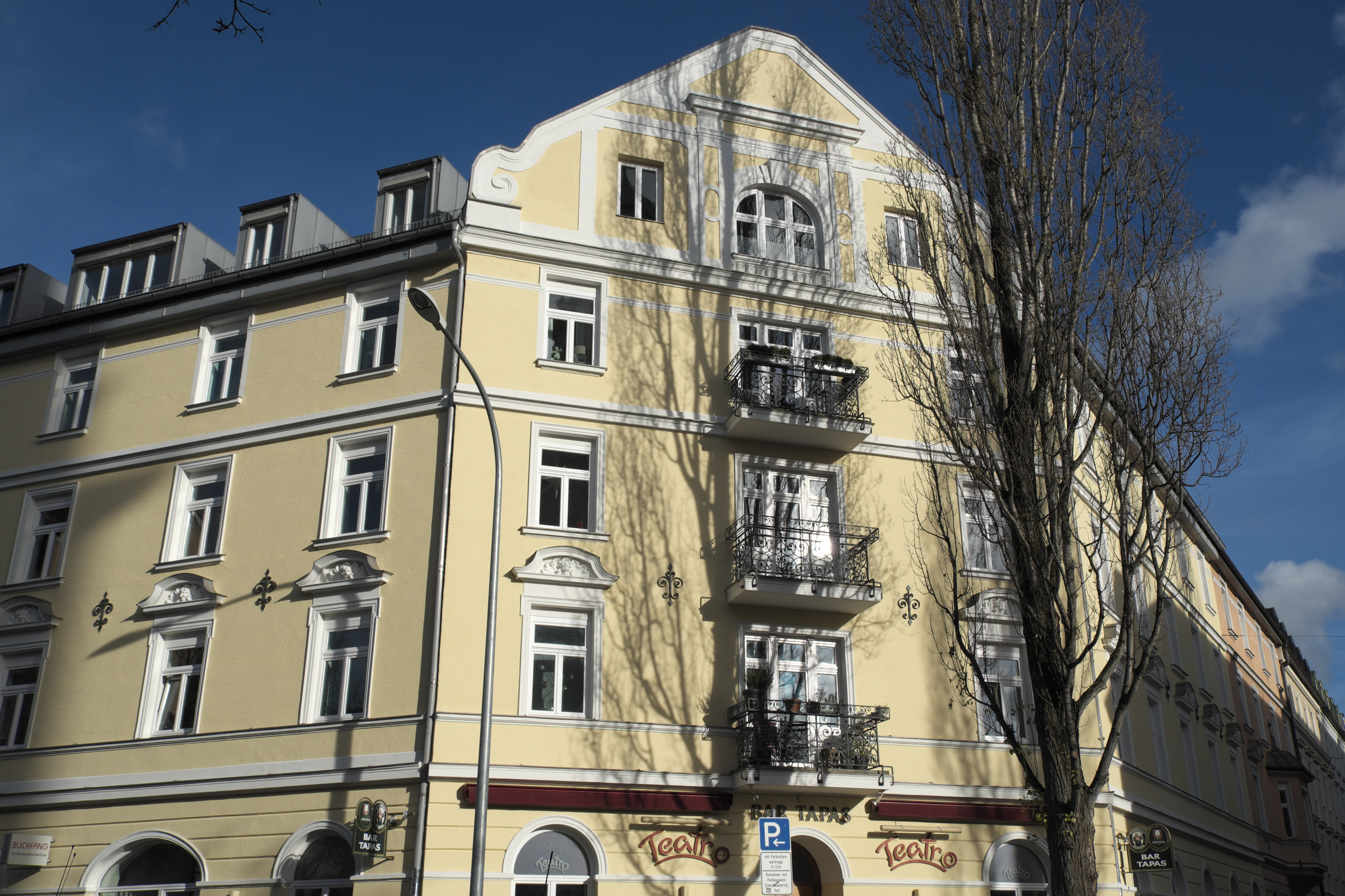 Mietshaus in der Balanstraße 23 in Haidhausen im Stadtbezirk Au-Haidhausen in München (Bayern/Deutschland), Ende 19. Jahrhundert erbaut